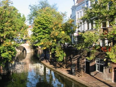 Utrecht, Oude Gracht, september 2003, foto gemaakt en ter beschikking gesteld voor vrij gebruik door Gebruiker:Ellywa. Categorie:Afbeelding Utrecht (stad)